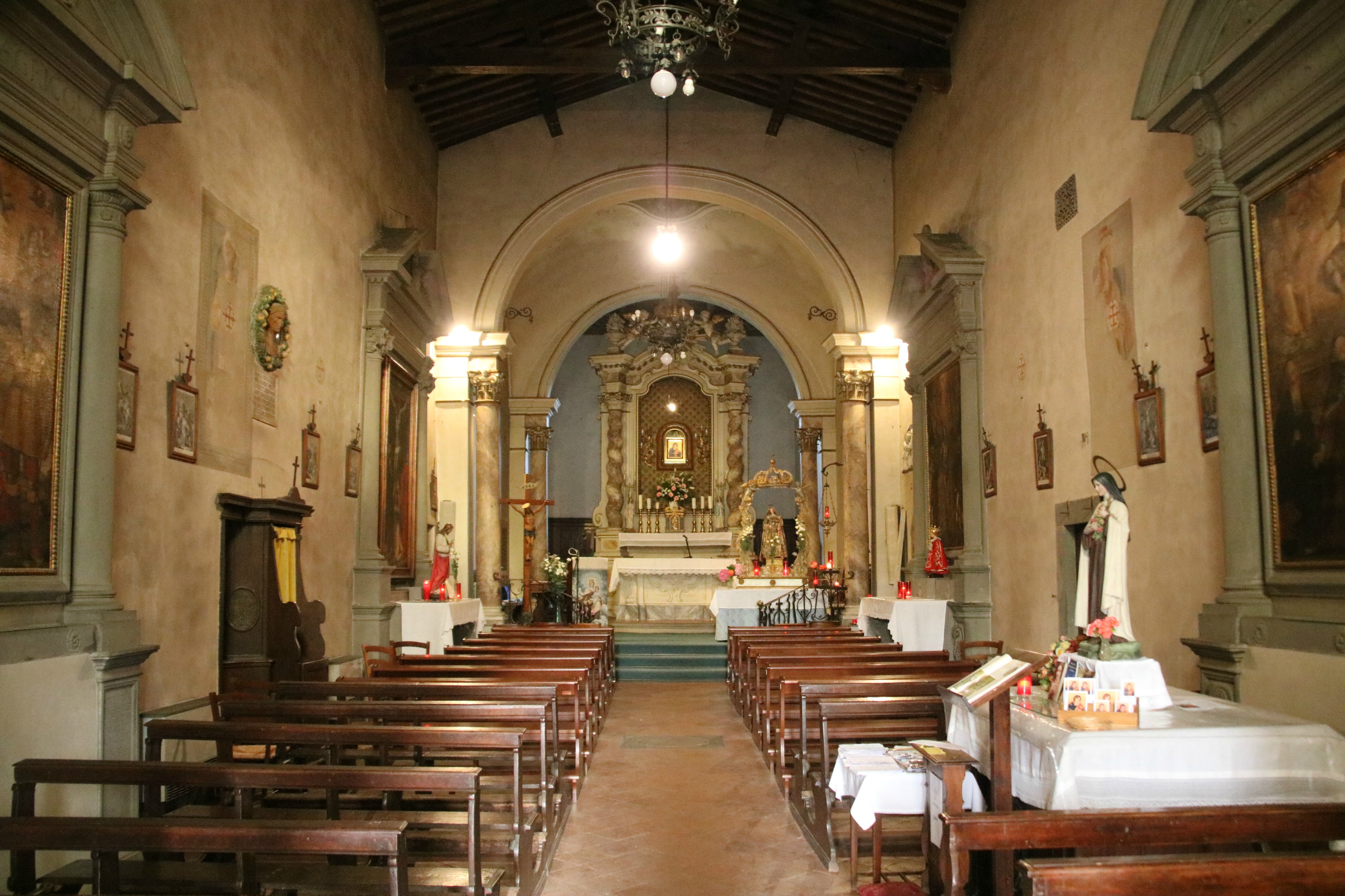 Chiesa di Santa Maria del Carmine al Morrocco (Tavarnelle Val di Pesa)